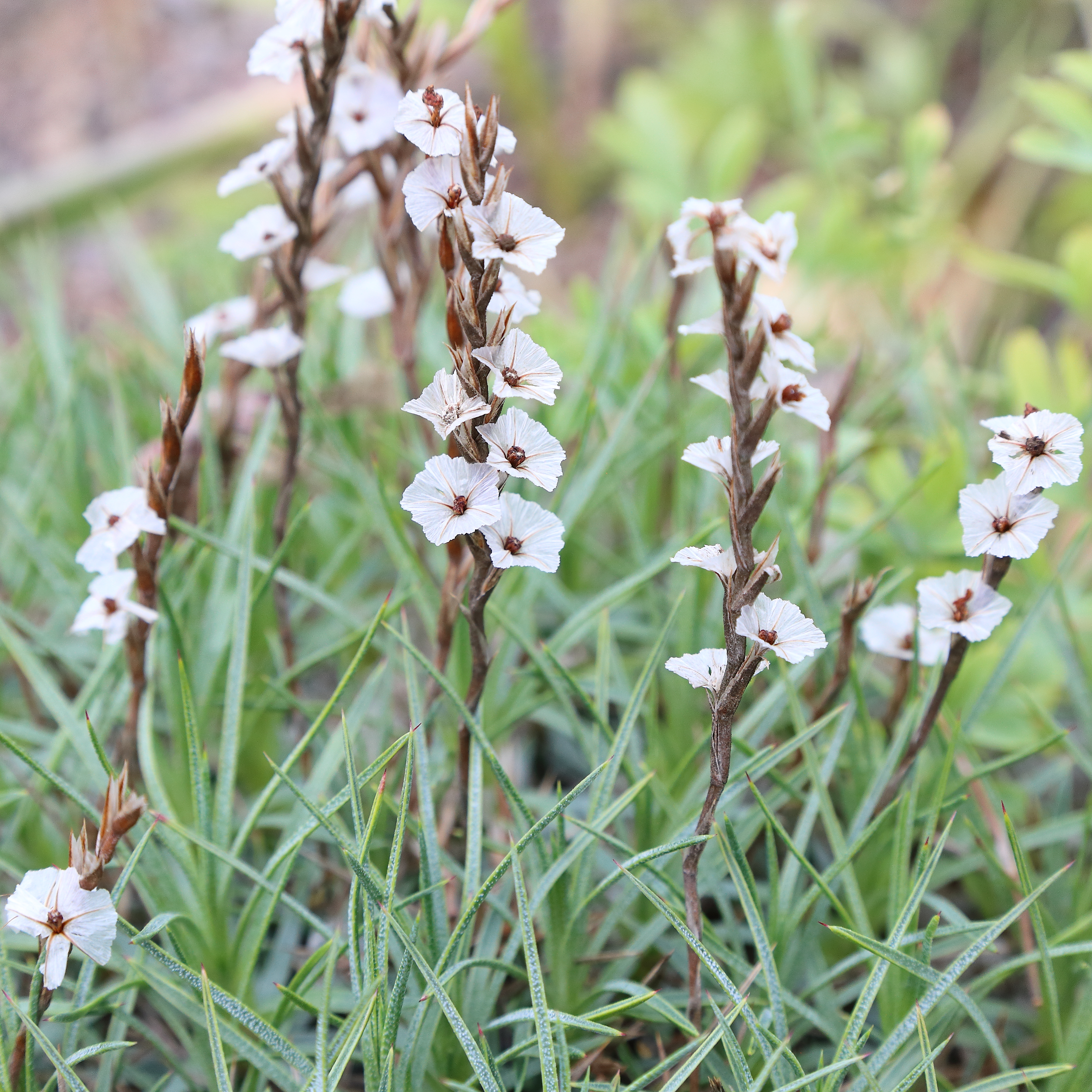 Acantholimon armenum identifierad med hjälp av skylt i Göteborgs botaniska trädgård.